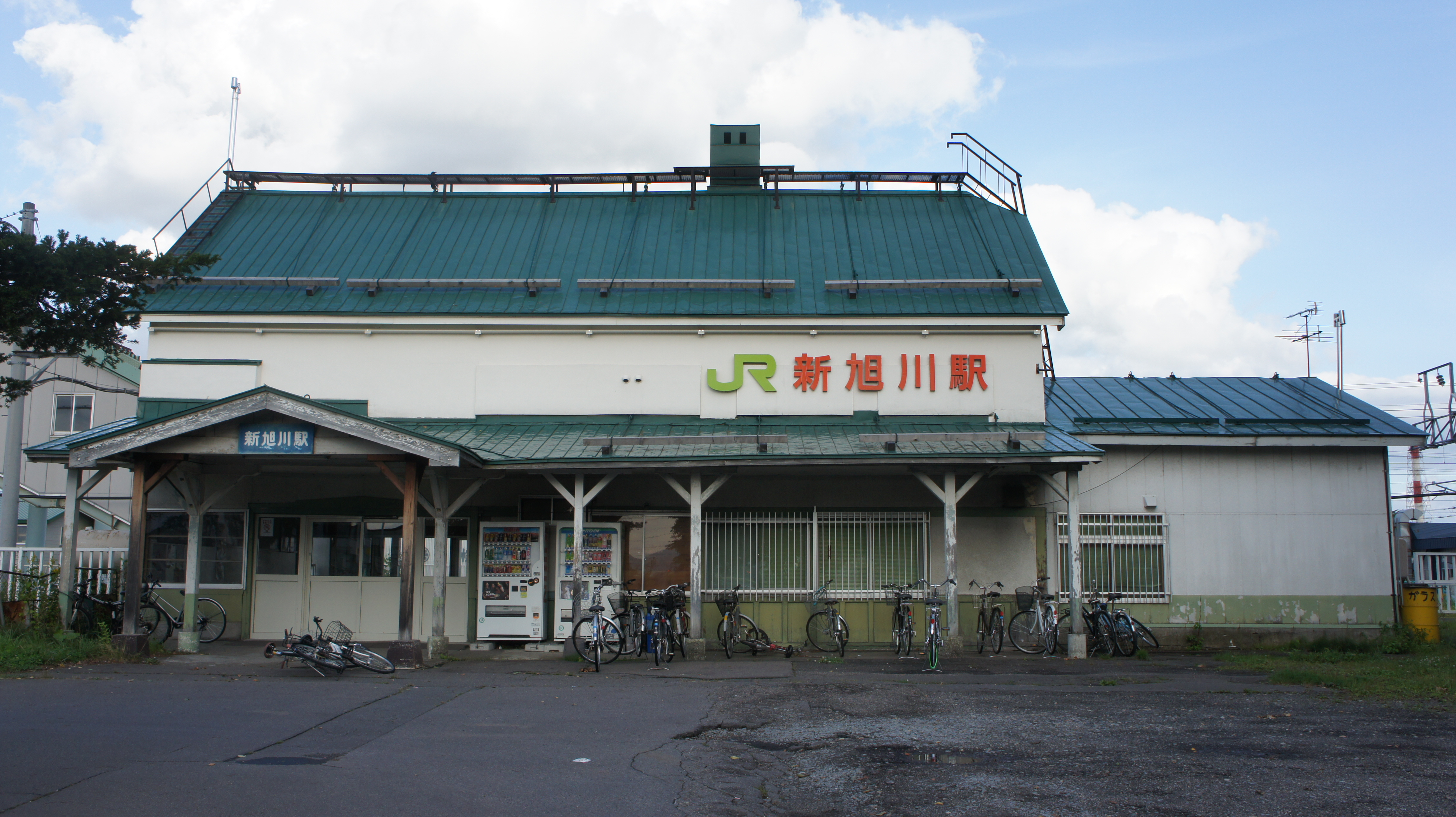 JR宗谷本線/石北本線・新旭川駅の駅舎 Sony NEX-3